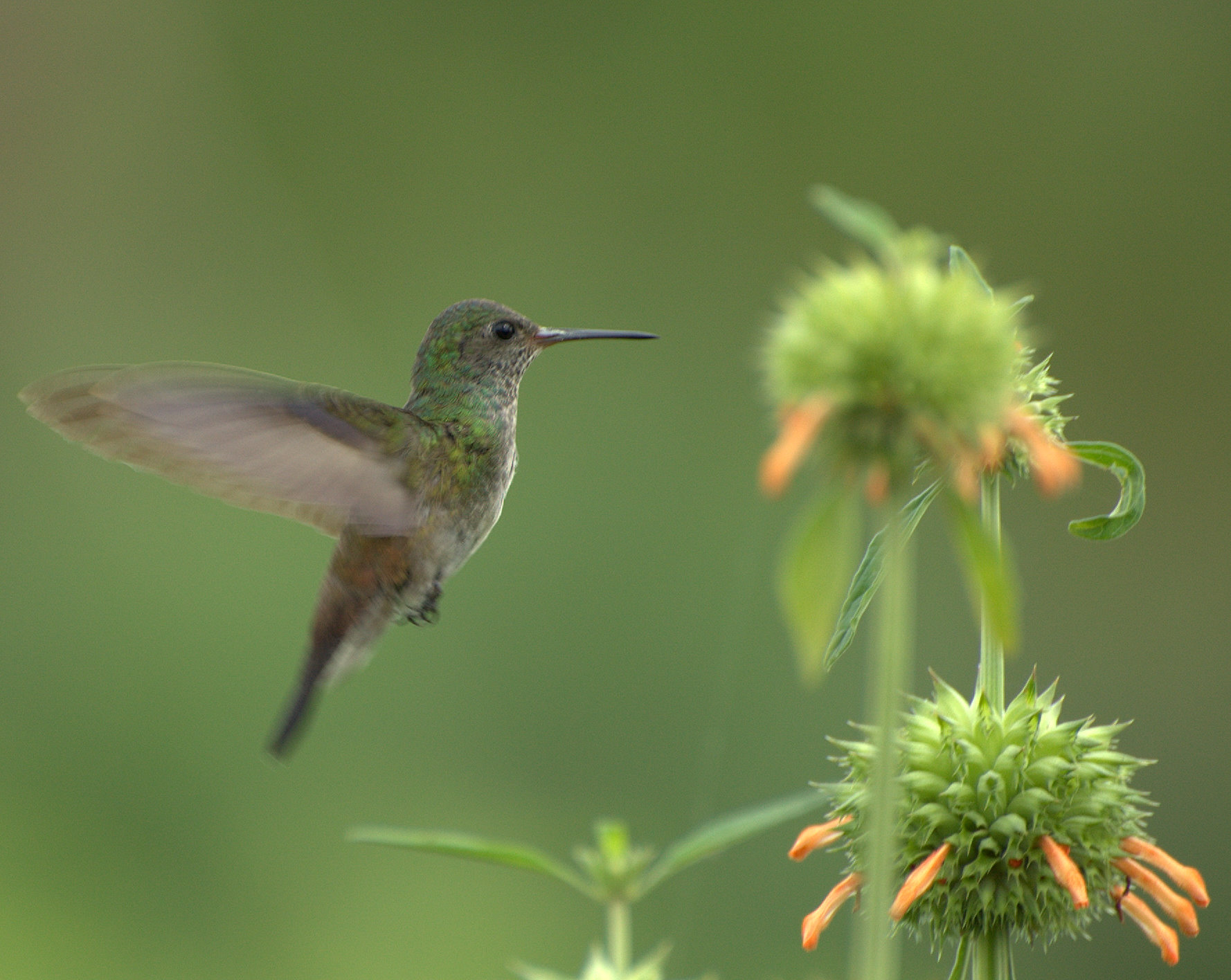 Margem do rio Ribeira de Iguape próximo à cidade de Registro-SP